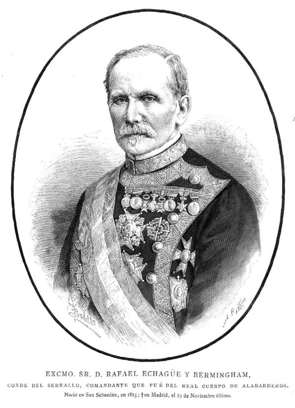 Rafael Echagüe y Bermingham